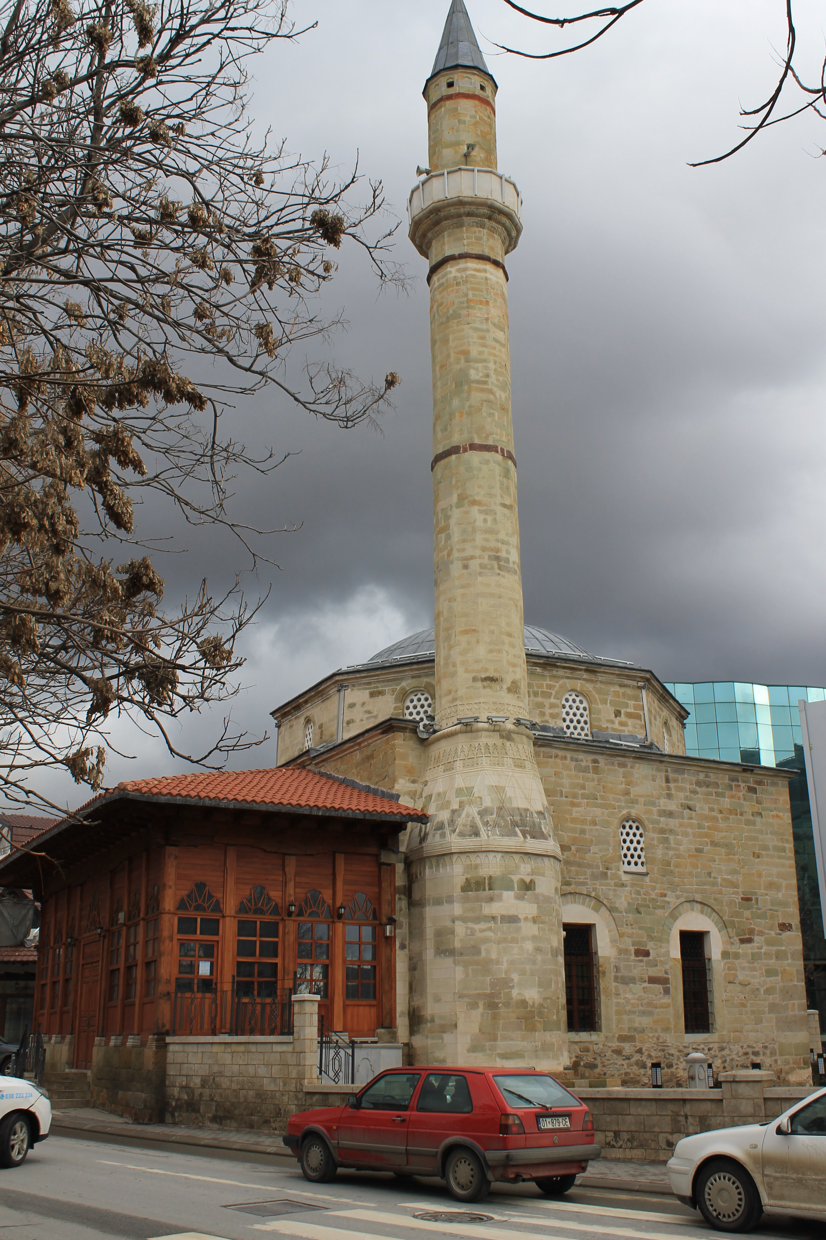 Xhamia është ndërtuar nga Jashar Mehmet Pasha